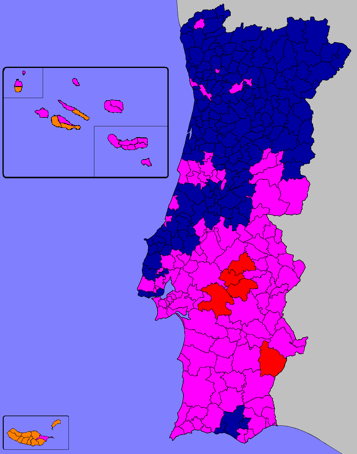 Mapa ilustrativa do partido mais votado por Concelho